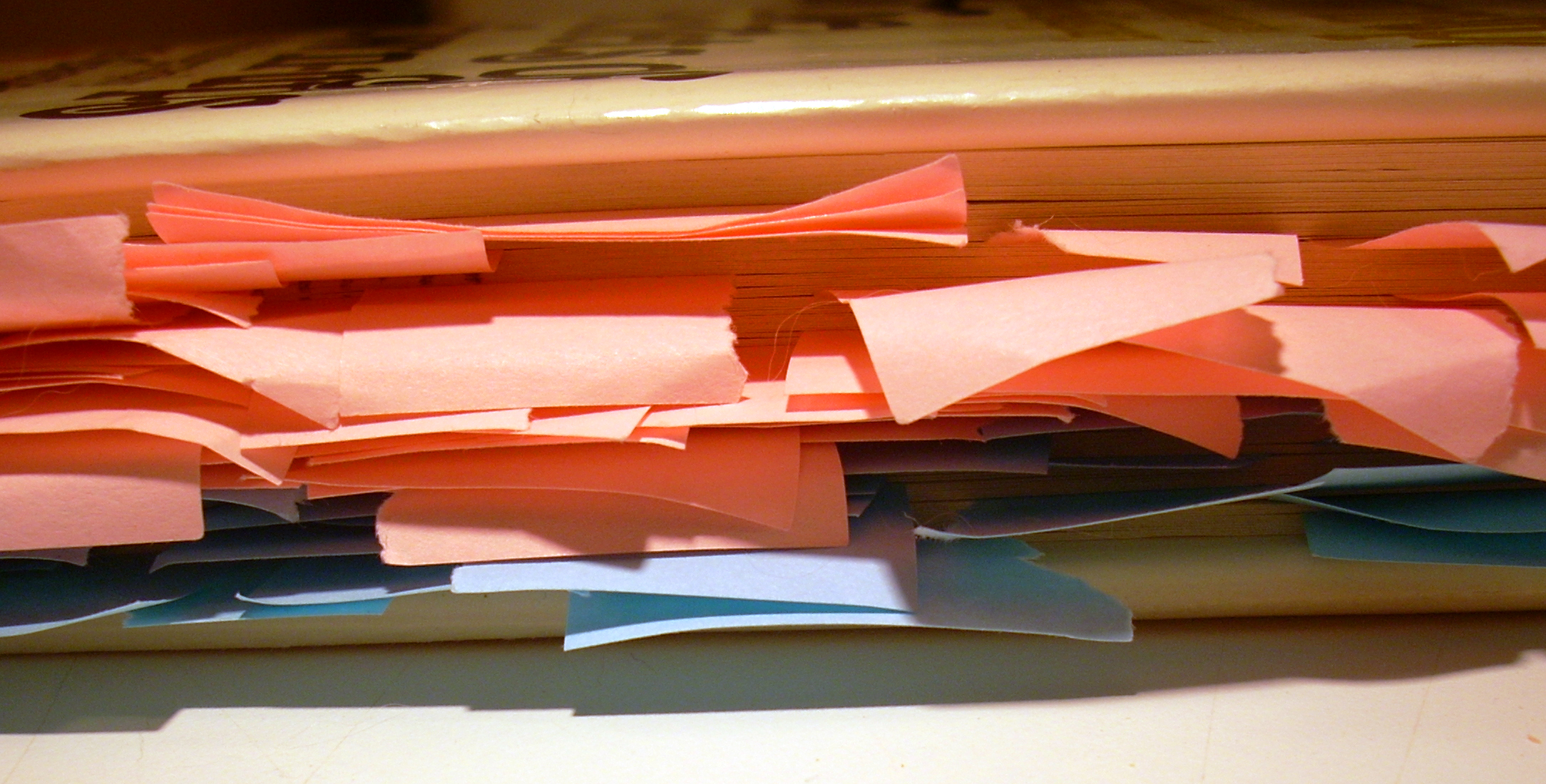 pressure sensitive adhesive note paper